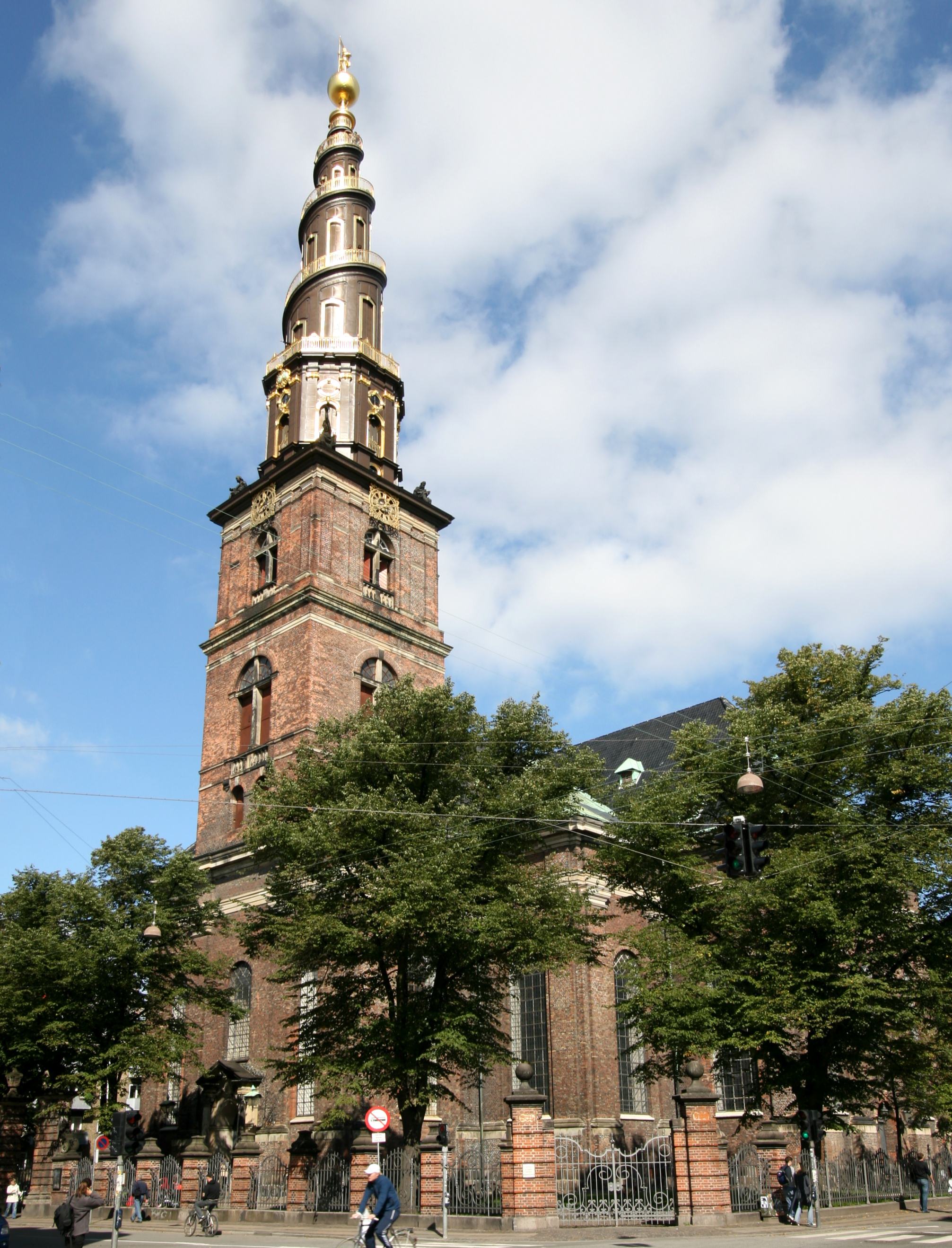 Vor Frelser Kirke (Church of Our Saviour), Copenhagen, Denmark.